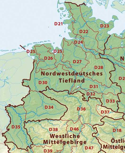 Haupteinheitengruppen des Nordwestdeutschen Tieflandes